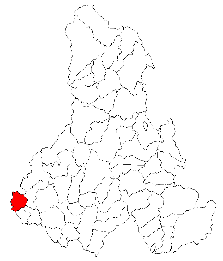 Categorie:Hărţi ale judeţului Harghita Contents 1 Licensing 2 Sursă 3 Licensing 4 Original upload log Licensing Sursă ro::Imagine:Harta_jud_Harghita.png